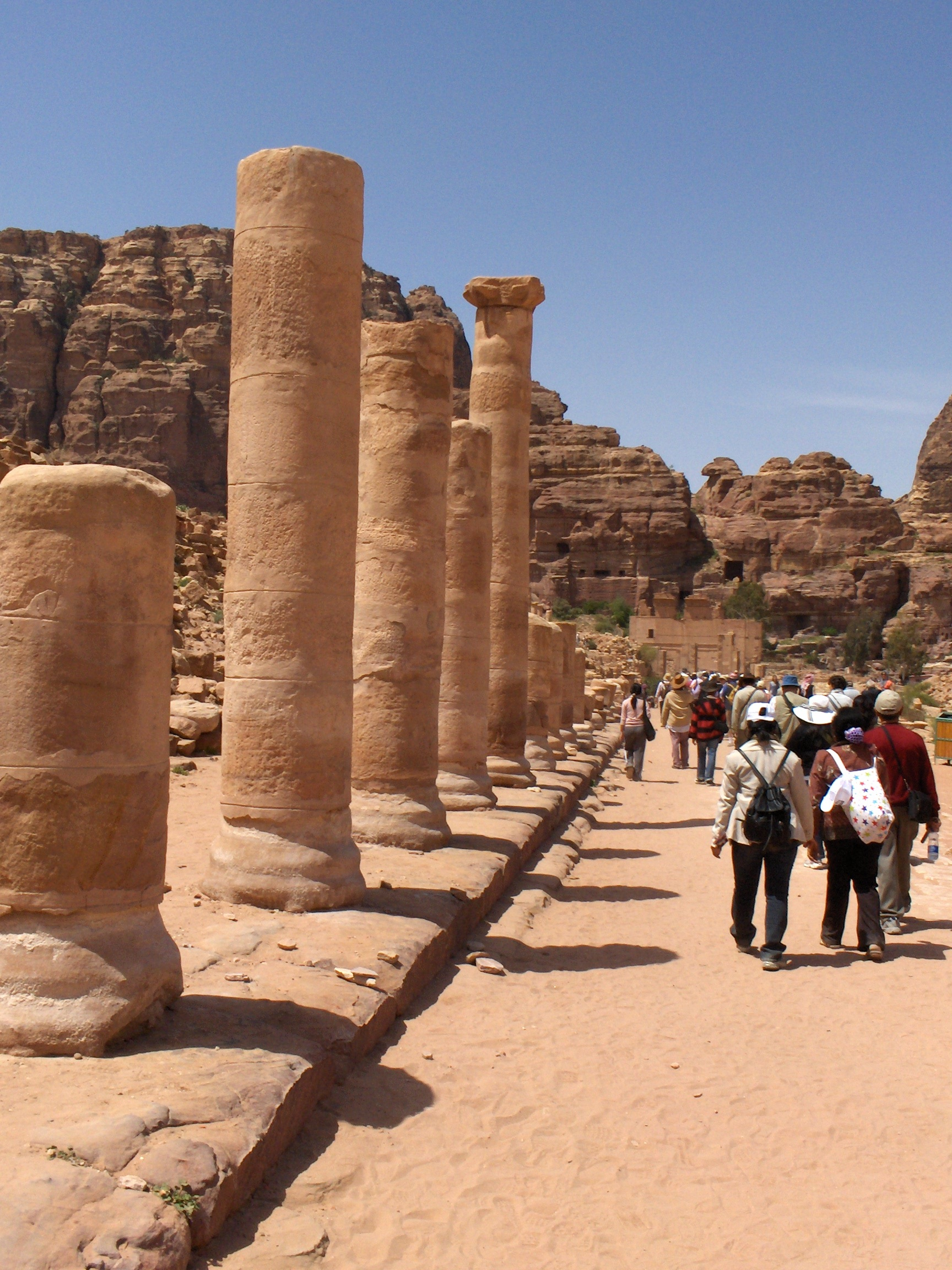 Disegno dell'originale via colonnata di Petra